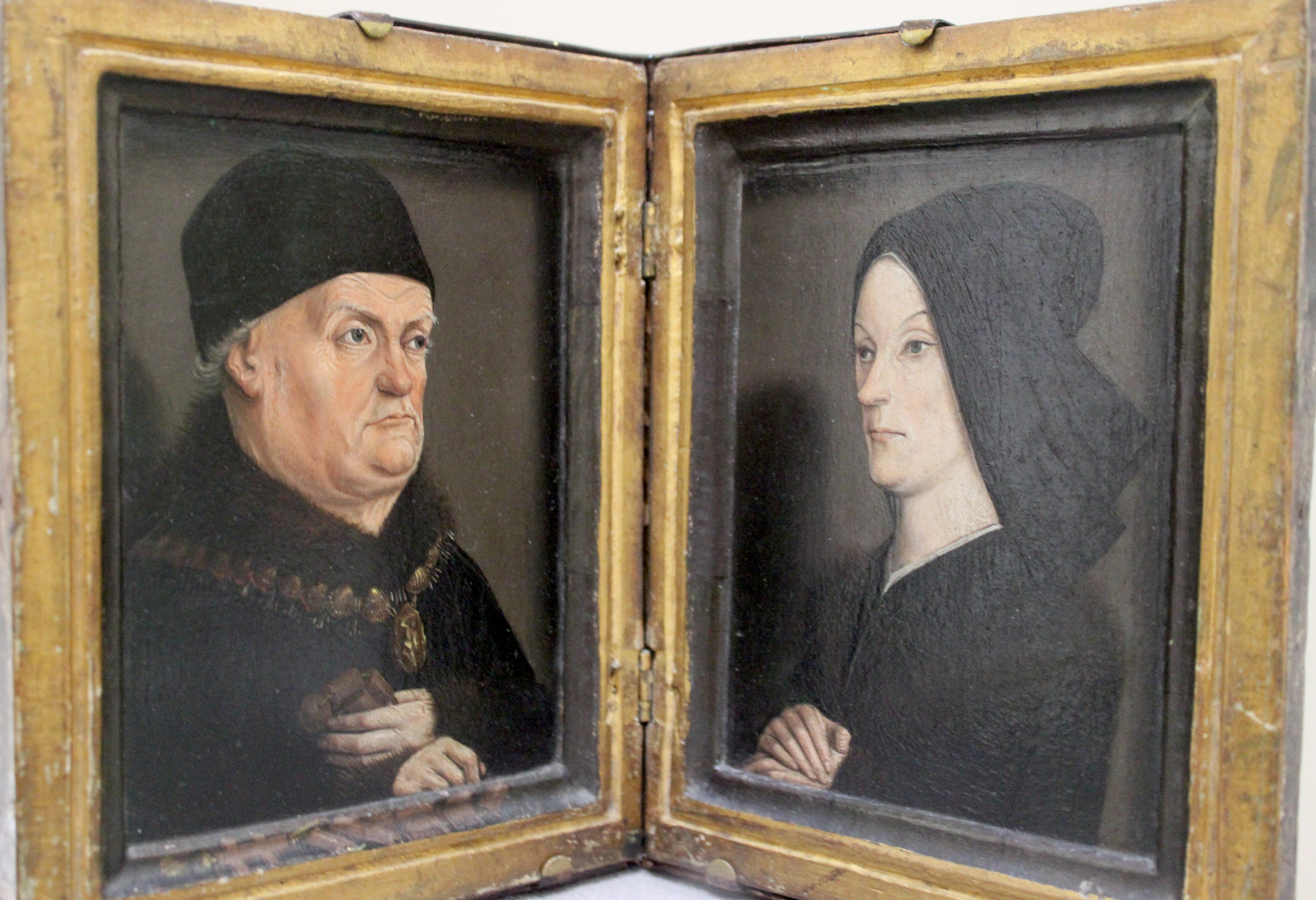 Louvre. Díptico Matheron, el rey René d'Anjou y su esposa.